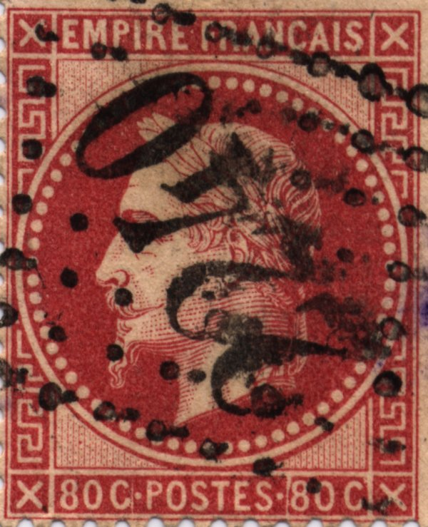 Timbre français type Napoléon III lauré, rouge.